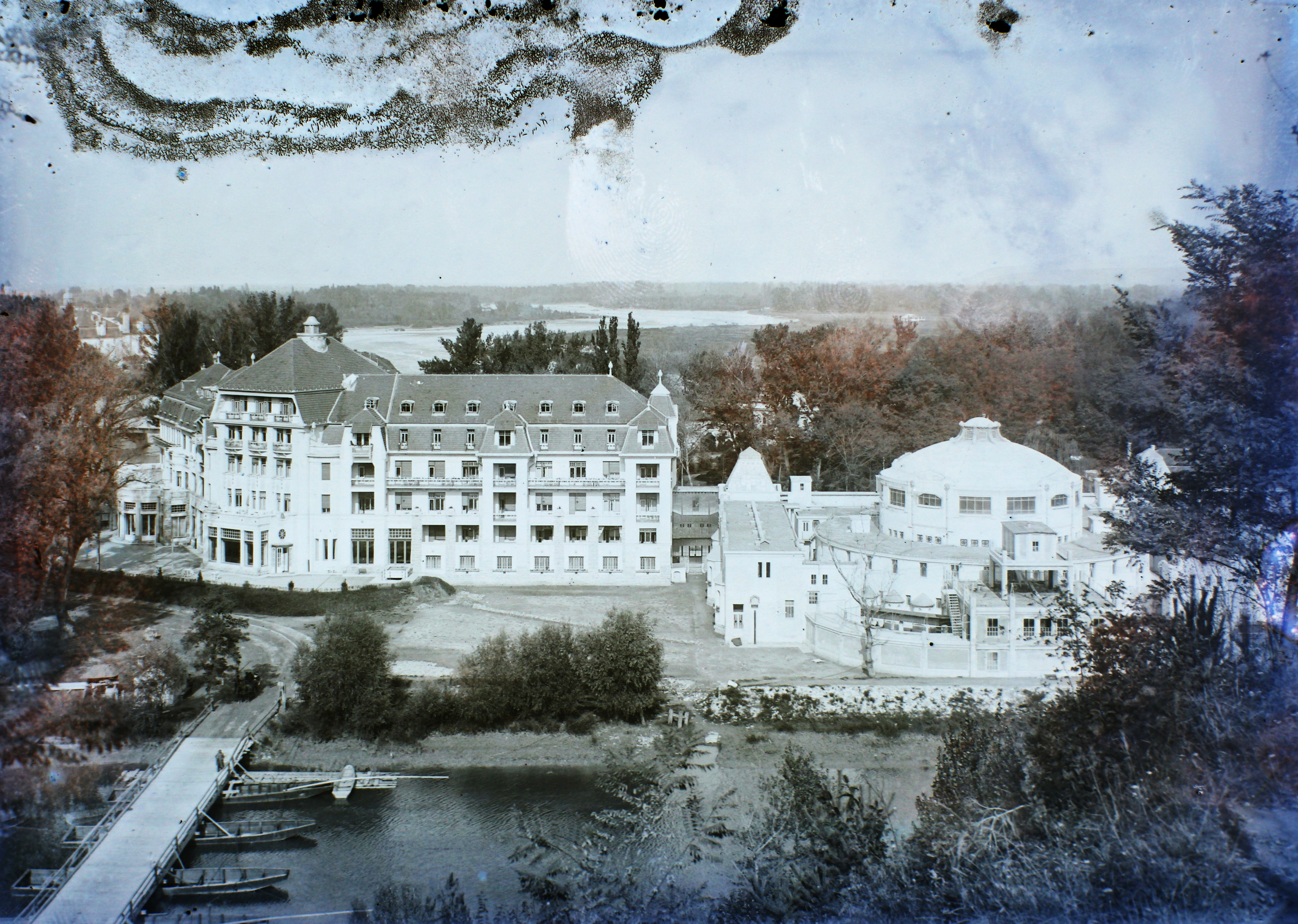 Fürdősziget, Thermia Palace szálló és az Irma fürdő. Location: Slovakia, Piestany Tags: hotel, bridge, river, island, Bath house Title: Fürdősziget, Thermia Palace szálló és az Irma fürdő.